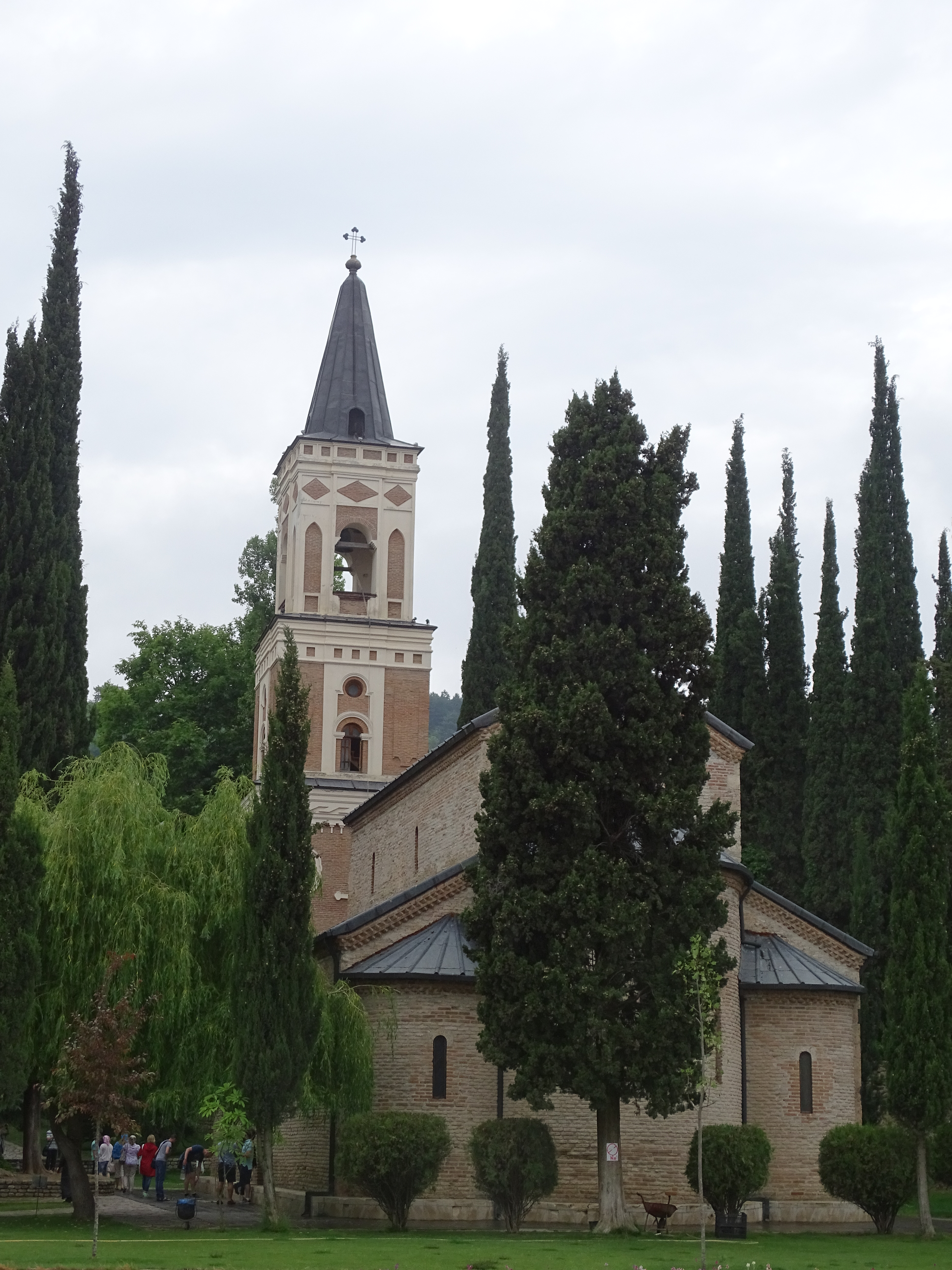 Das Bodbe Kloster bei Sighnaghi ist besonders verbunden mit der Hl. Nino.